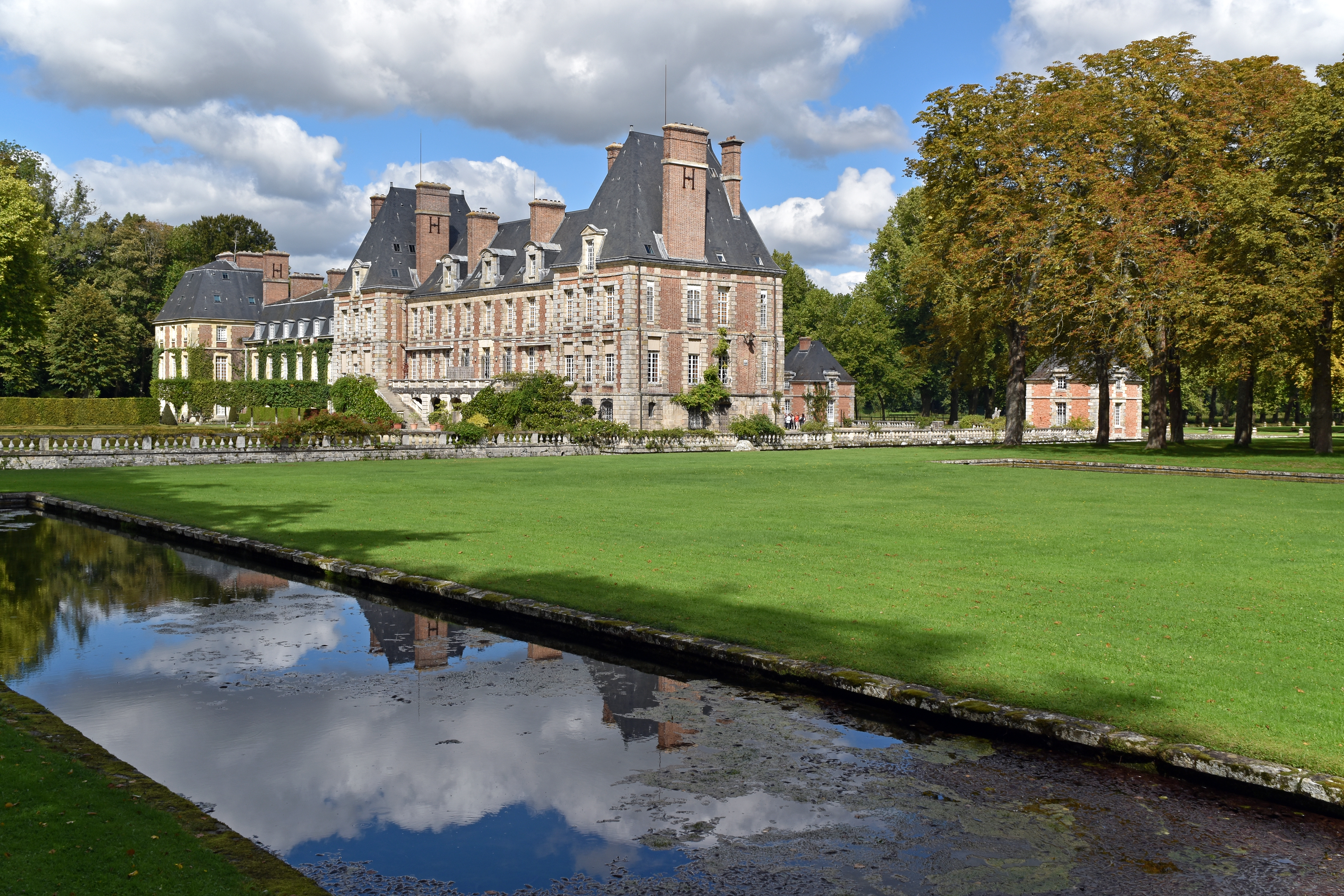 Château de Courances, Essonne, France .